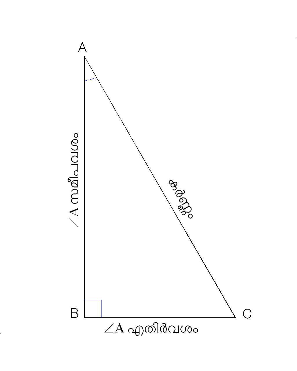 ത്രികോണമിതി താളിൽ‌ ചേർക്കാൻ..